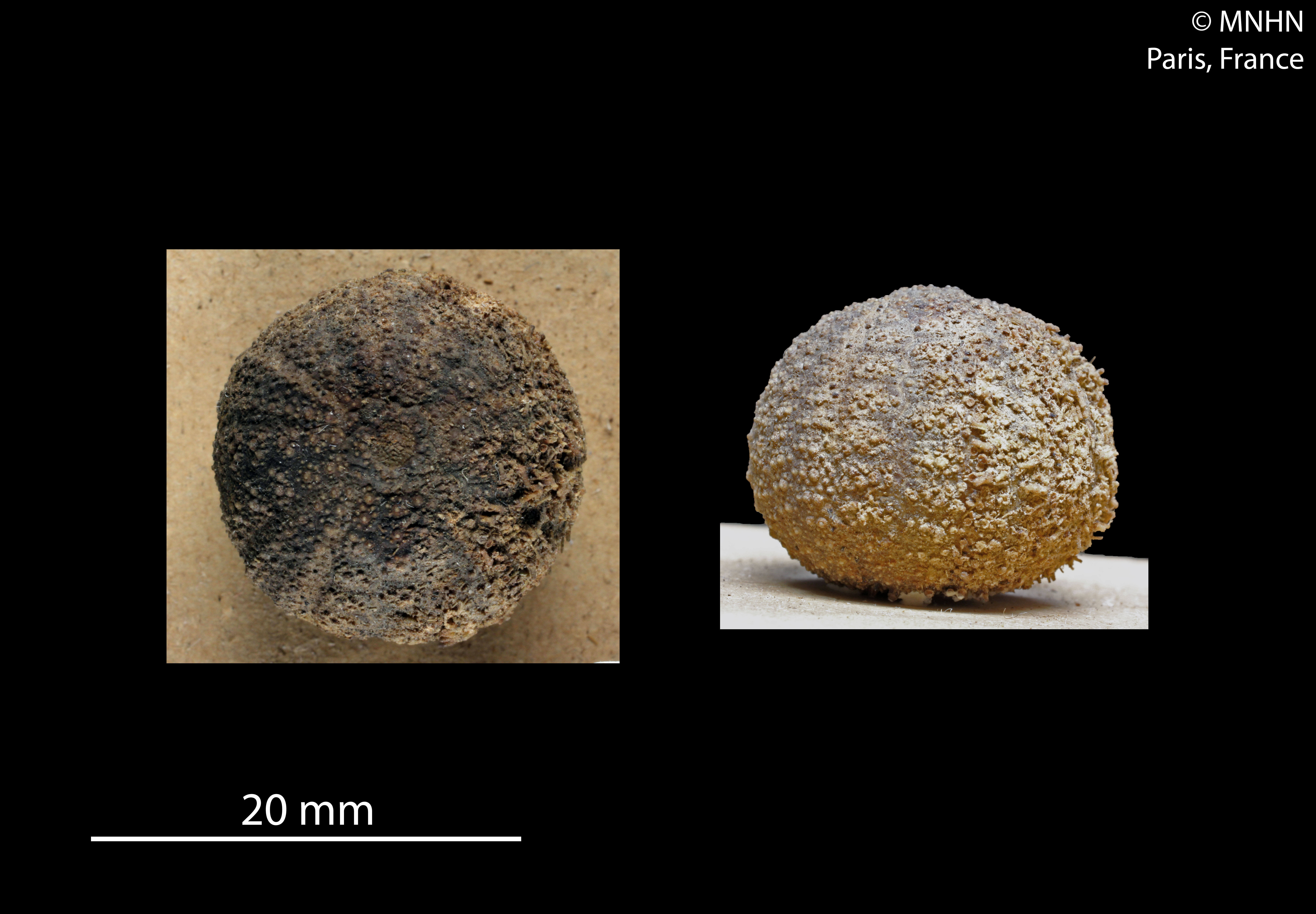 Microcyphus zigzag d'Australie, collection du Muséum National d'Histoire Naturelle (Paris, France). Origine : Libellé du pays : AUSTRALIE Océan : Pacifique sud